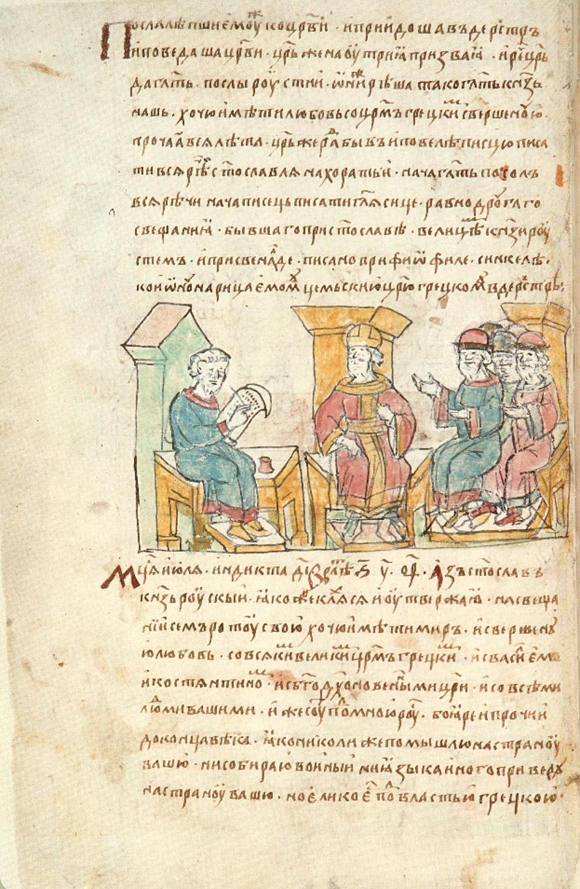 Русско-византийский договор 971 года Радзивиловская рукопись лист 88